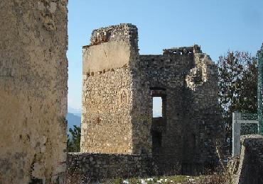 Il castello medievale nel borgo di Castello.